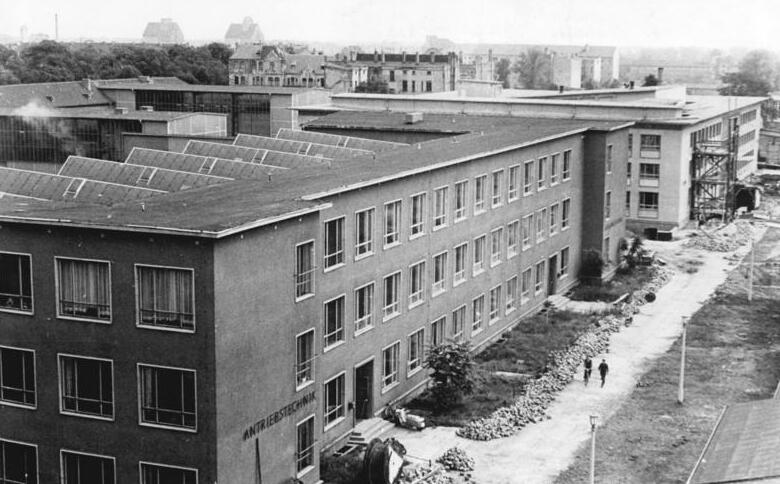 Magdeburg, Technische Hochschule, Neubauten Zentralbild Biscan Sta-Pr 2.9.1963 10 Jahre Technische Hochschule Magdeburg 850 Diplomingenieure haben an der Technischen Hochschule "Otte von Guericke" seit deren Gründung vor zehn Jahren ihre Ausbildung erhalten. An der bis dahin bestehenden Hochschule für Schwermaschinenbau lehrten 27 Professoren und Dozenten. Heute umfasst der Lehrkörper der TH 70 Professoren, Dozenten und wissenschaftliche Mitarbeiter, denen 209 Assistenten zur Seite stehen. Für den Bau und die Ausrüstung der TH stellte der Staat 105 Millionen DM zur Verfügung. UBz: Blick auf Neubauten der TH. Der ganze Baukomplex erstreckt sich auf eine Fläche von 25 Hektar.